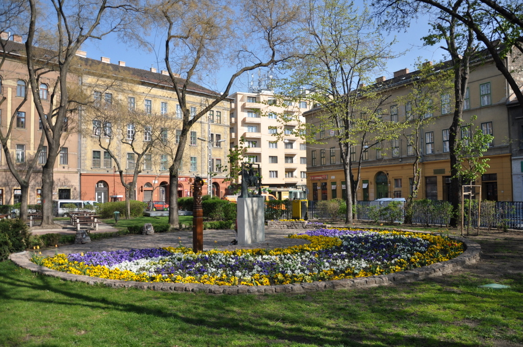 Klauzál Square, Budapest